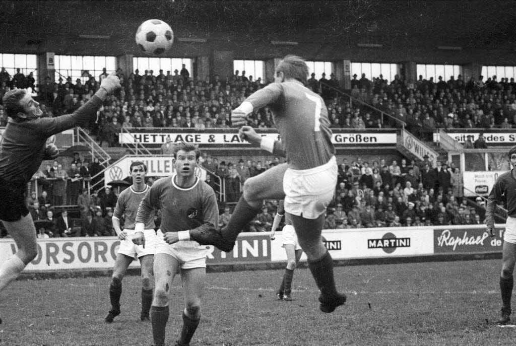 im Holsteinstadion. Im Bild u.a. Holsteins Torwart Friedemann Paulick (1.v.l.).